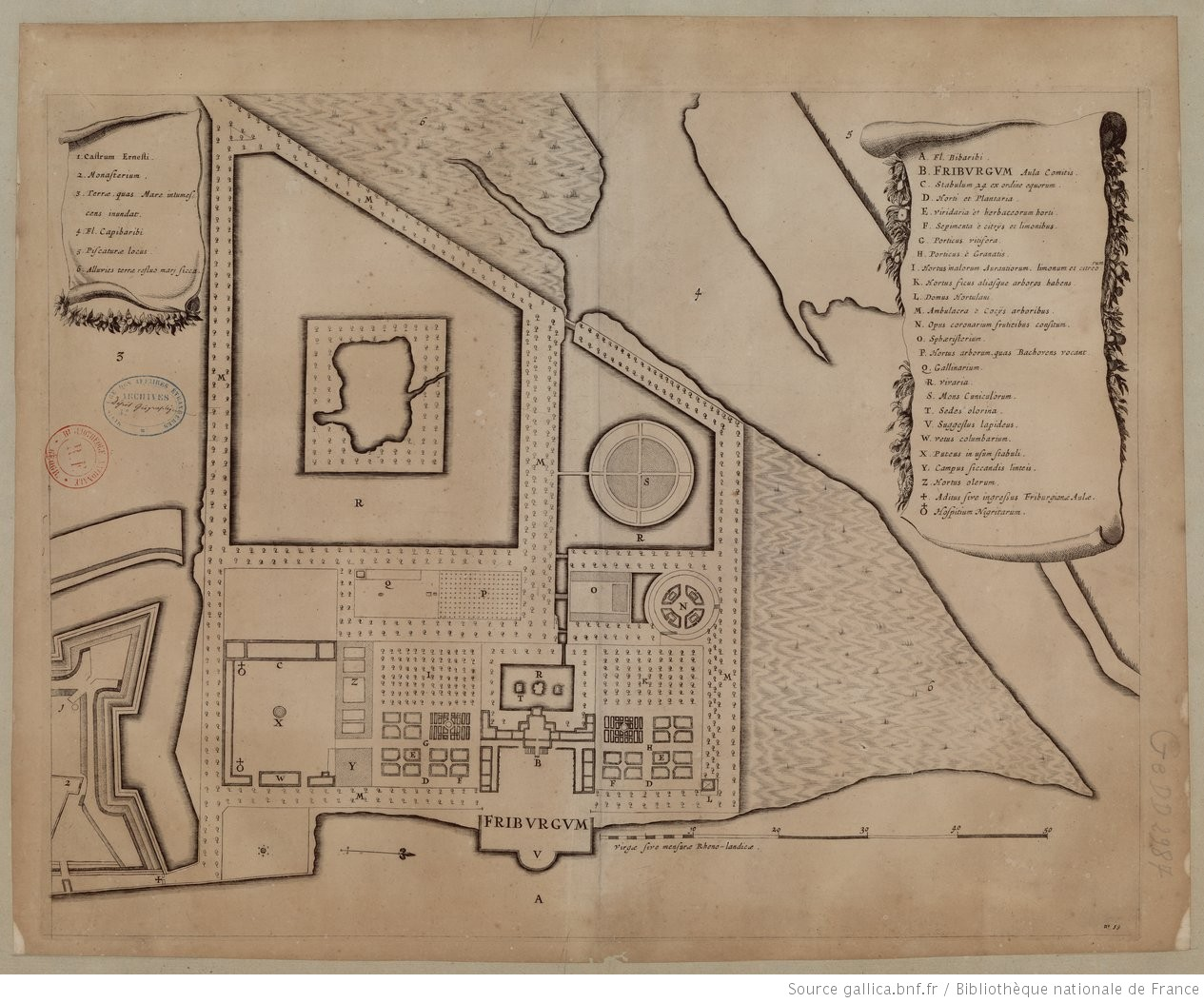 Palácio de Frigurgo na cidade Maurícia